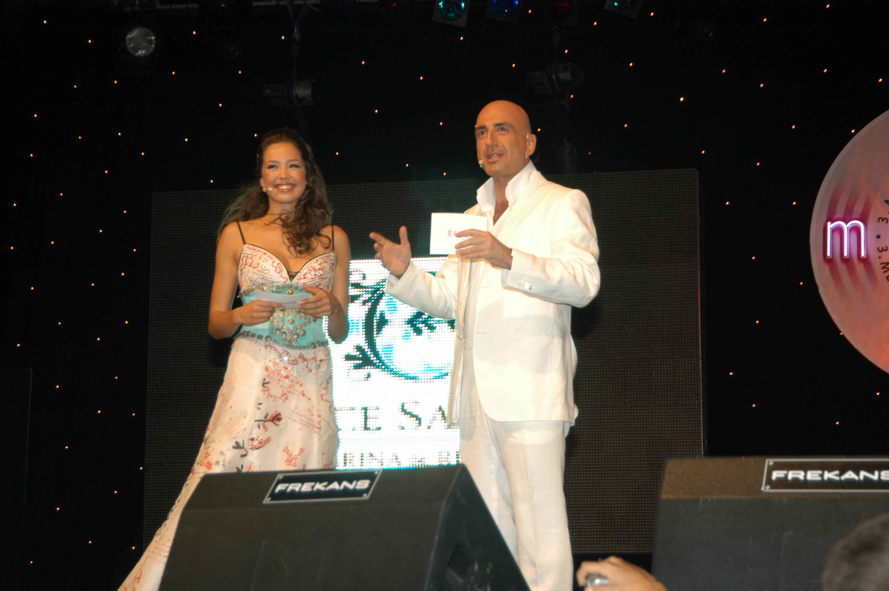 2004 Megahit-Uluslararası Akdeniz Şarkı Yarışması'ndan bir görünüm.